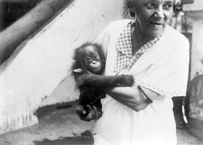 Negatief. Een vrouw met een orang-oetan uit de dierentuin van Medan, Noord-Sumatra